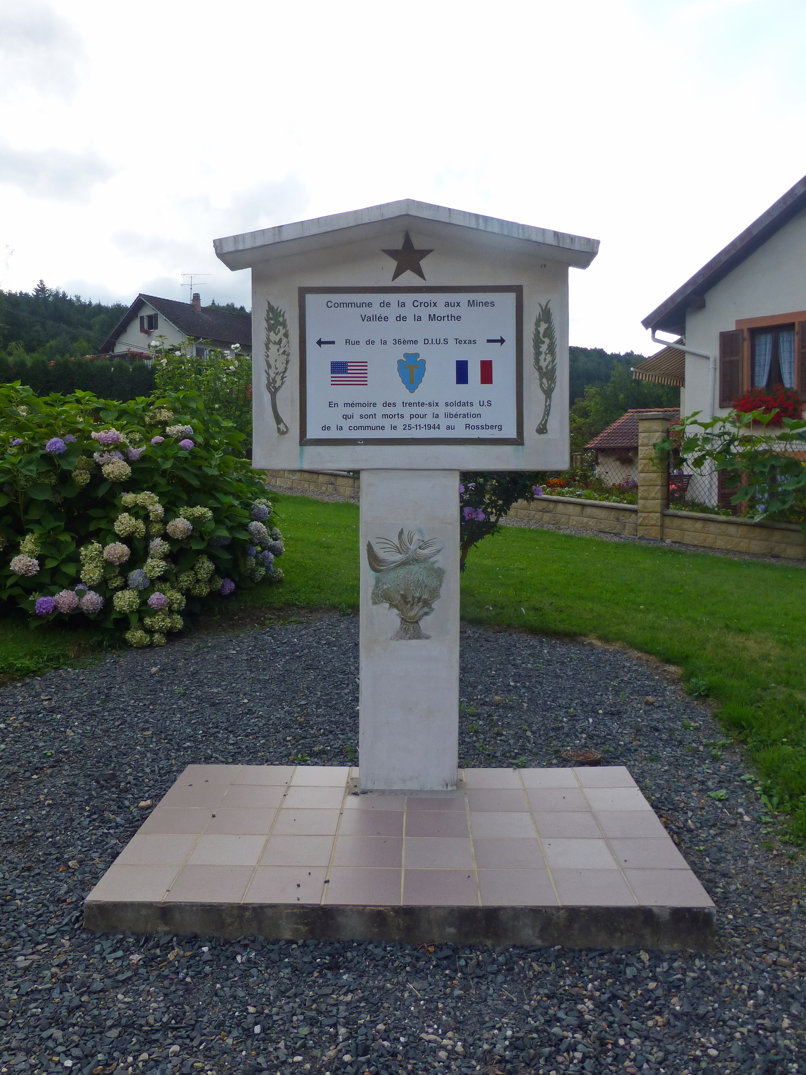 Le Chipal, rue de la 36e DIUS Texas (La Croix-aux-Mines, Vosges)